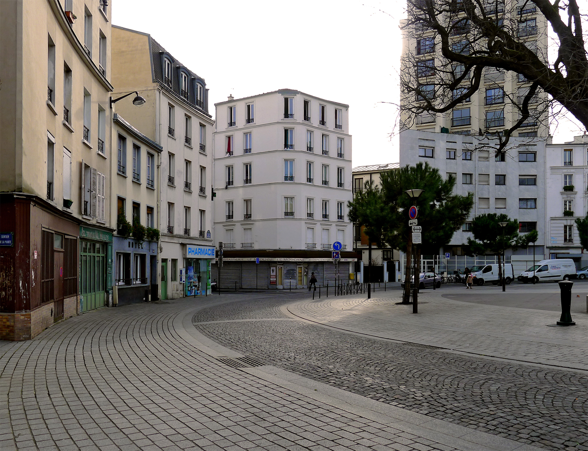 Place de la Réunion - Paris XX